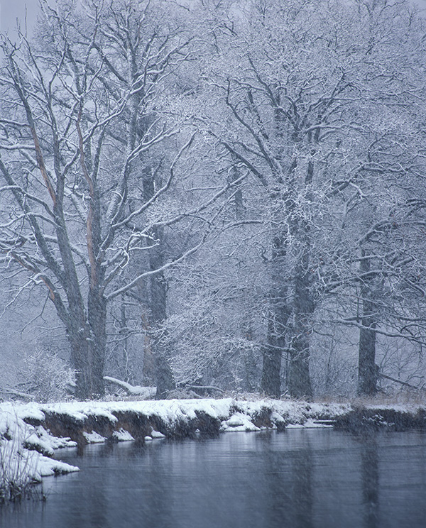 Река Нерусса. Территория заповедник "Брянский лес"